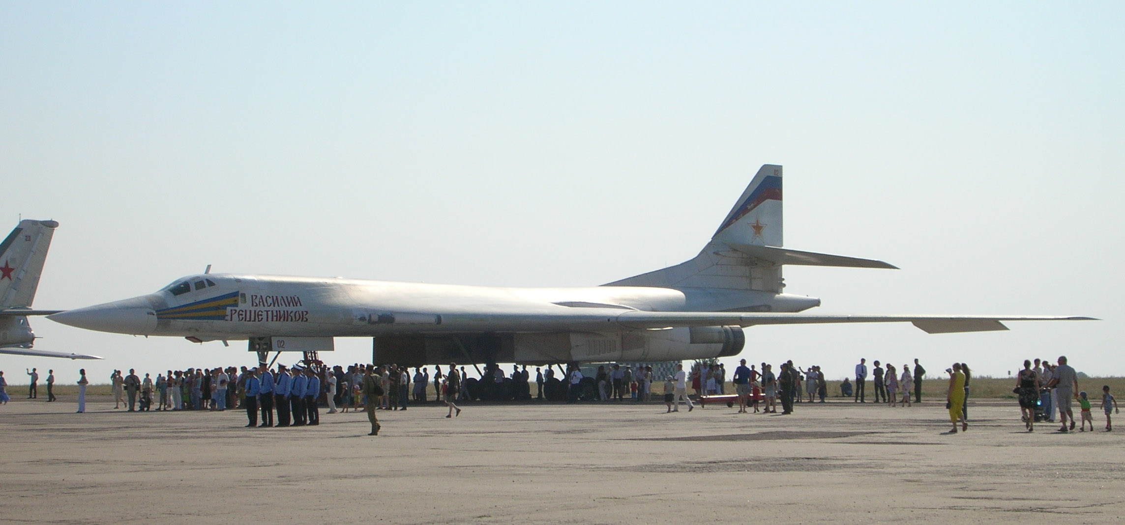 Стратегический ракетоносец Ту-160 «Василий Решетников» (б.н. 02) на авиабазе Энгельс.